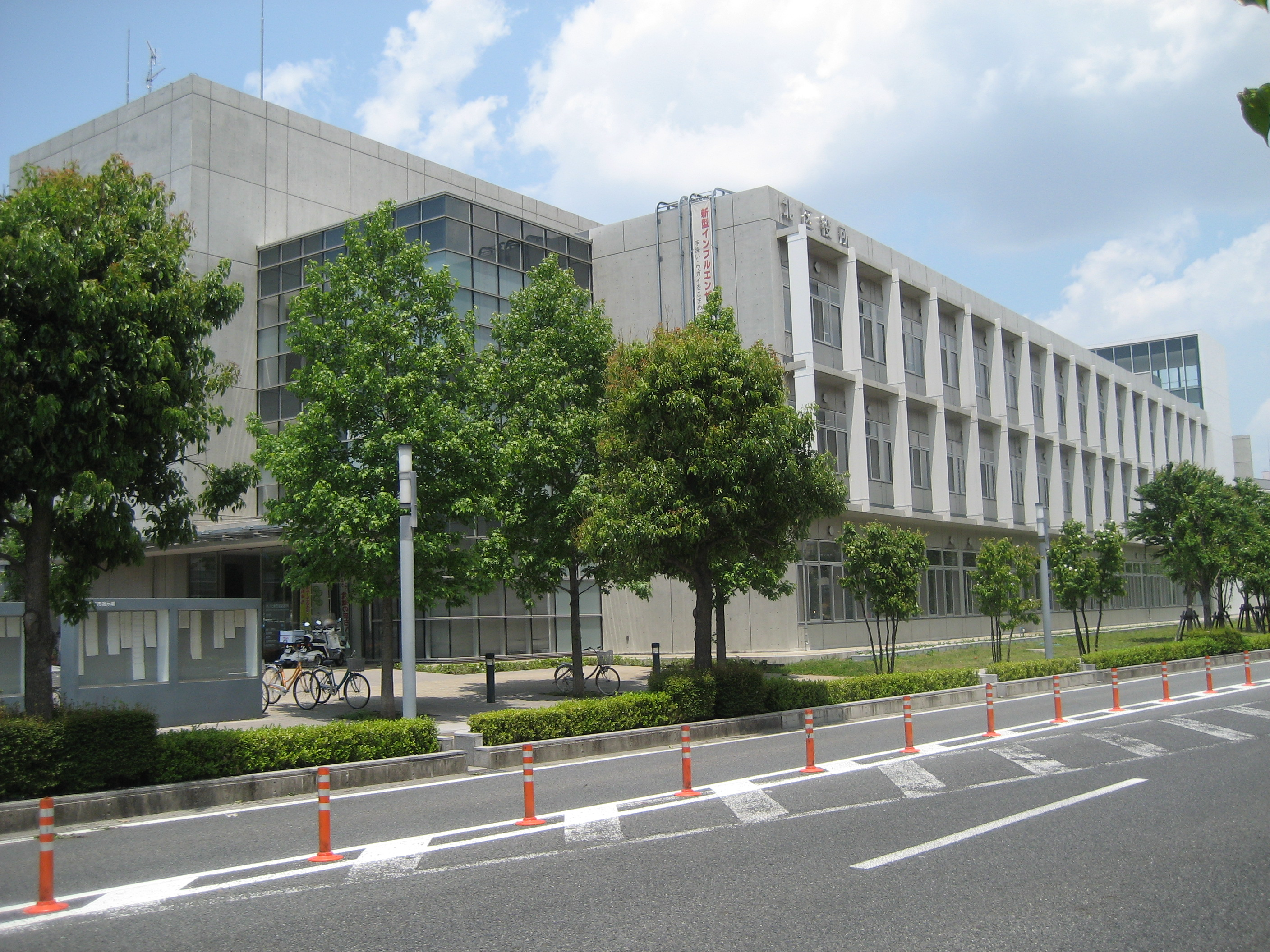 さいたま市北区役所庁舎